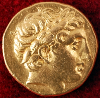 Srpski (latinica): Avers statera Filipa II Makedonskog od zlata iz perioda 359-336. p.n.e. Slučajni nalaz na lokalitetu Lusarije u Orašcu. Deo je zbirke Numizmatika I Narodnog muzeja u Leskovcu.